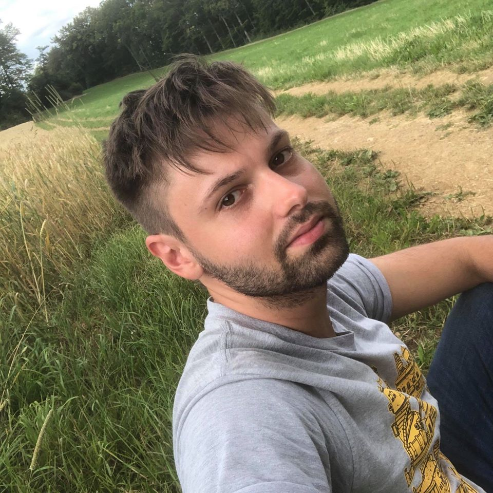 Simon Abt 2020